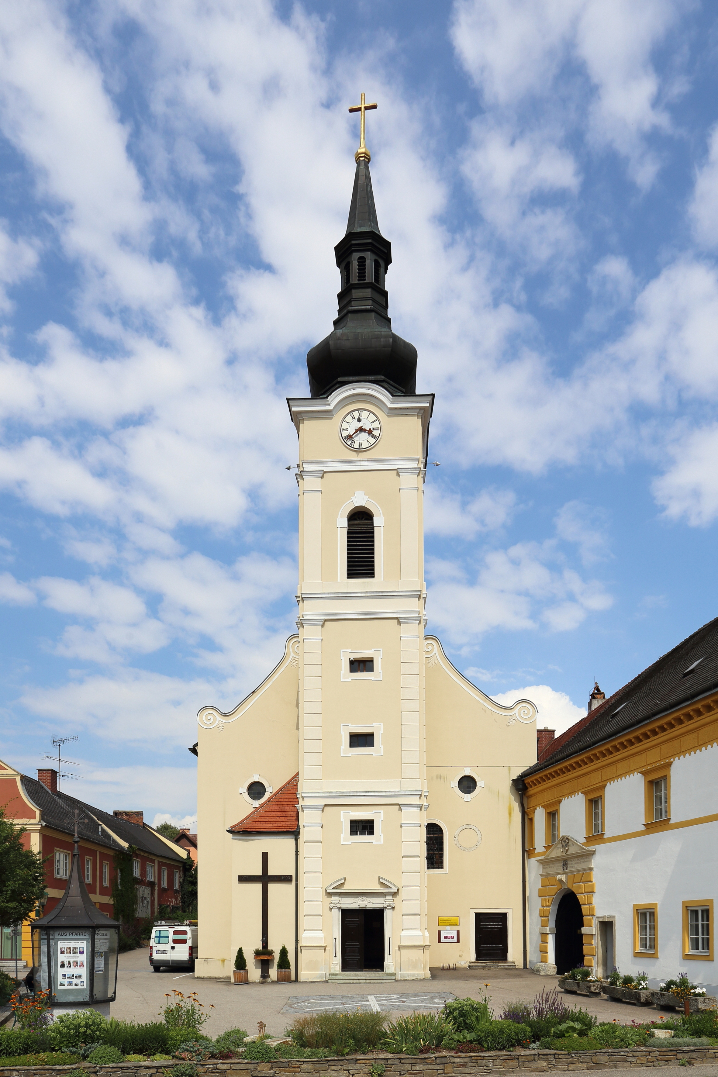 Katholische Pfarrkirche hll. Simon und Thaddäus in der niederösterreichischen Marktgemeinde Gars am Kamp. Nach Bränden 1620 und 1724 wurde die Kirche in den Jahren 1724–1724 unter Verwendung älterer Teile und des Chores als barocke Saalkirche neu errichtet.